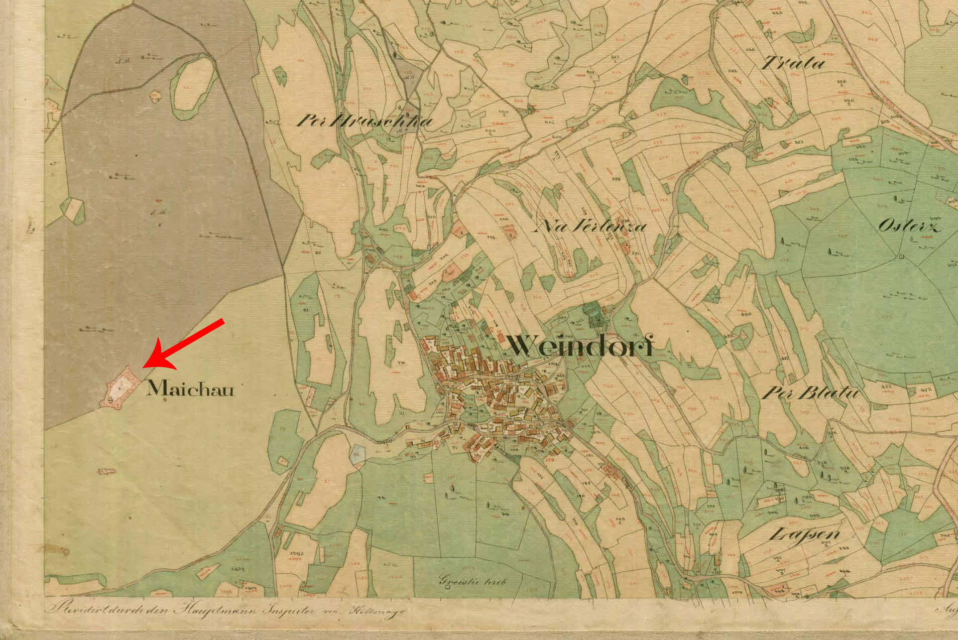 Franciscejski kataster za Kranjsko, 1823-1869